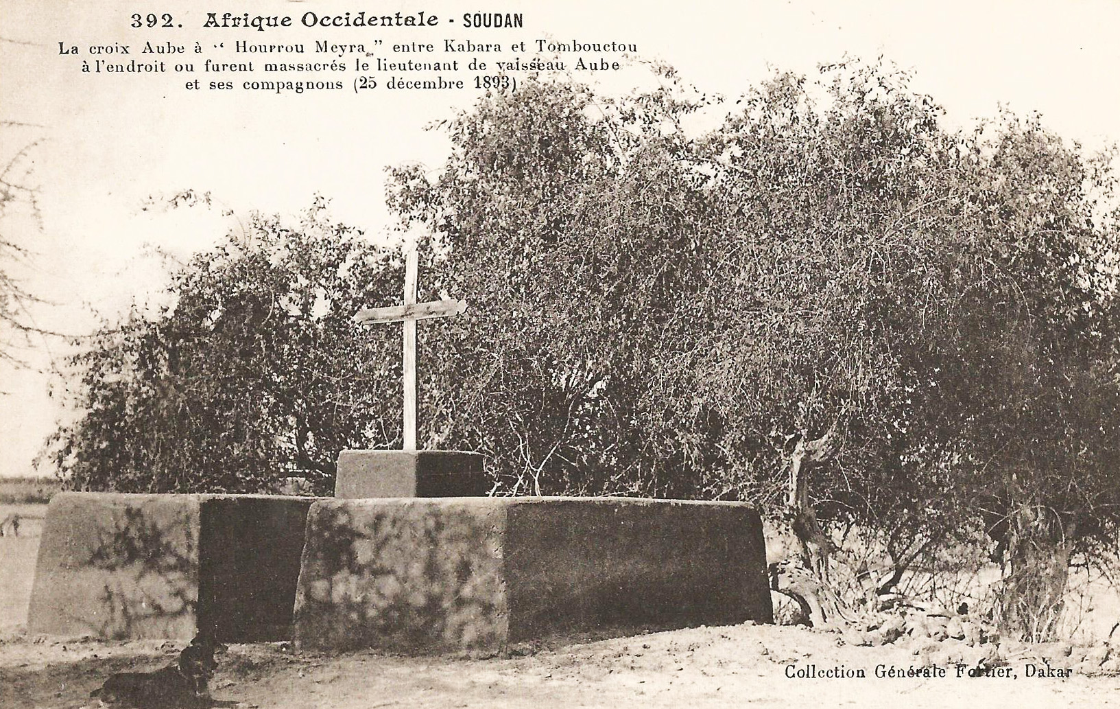 François-Edmond Fortier, La croix Aube à Hourrou Meyra entre Kabara et Tombouctou, à l'endroit où furent massacrés le lieutenant de vaisseau Aube et ses compagnons (25 décembre 1893). Afrique Occidentale - Soudan.